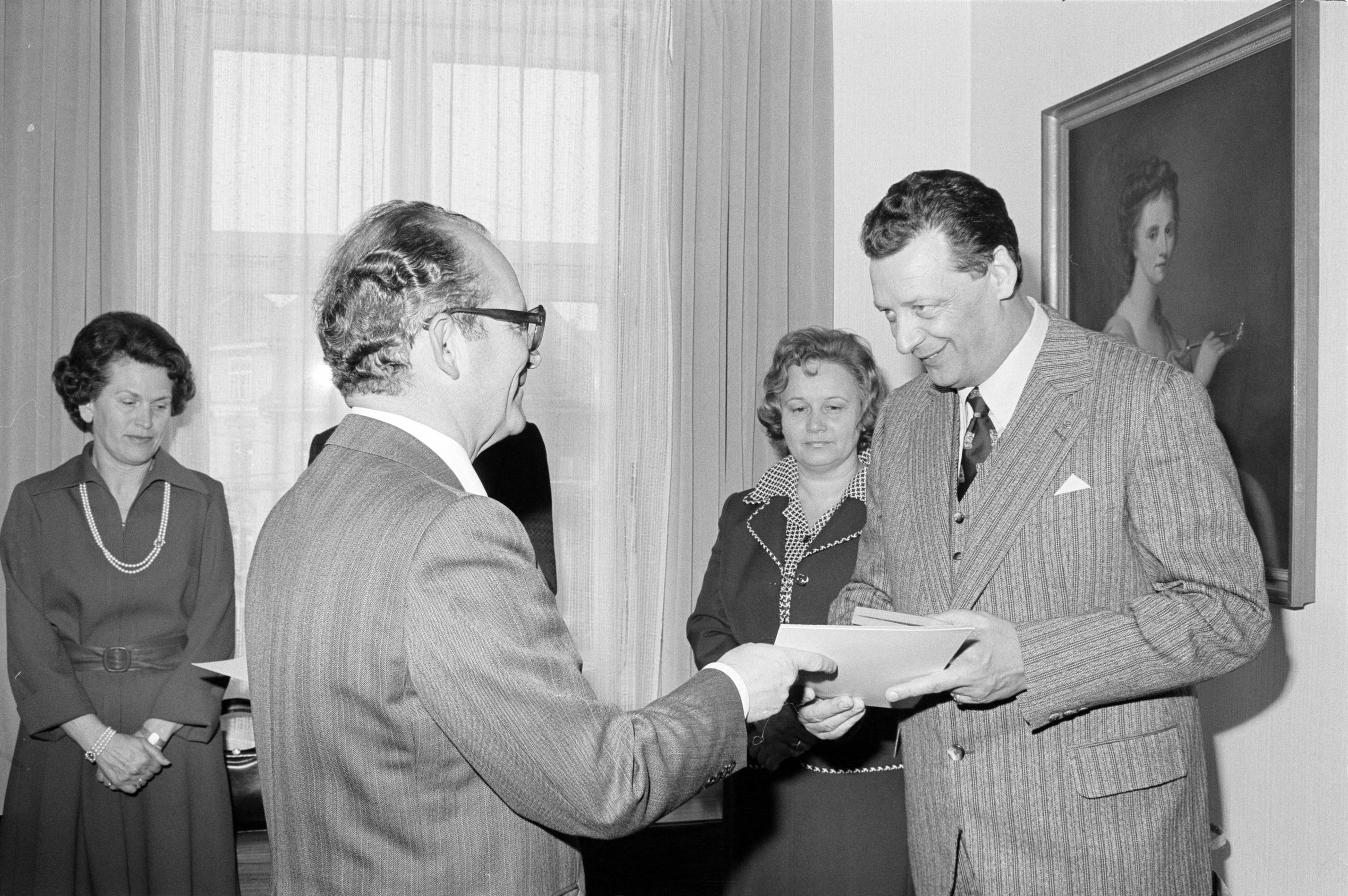 Der Vorarlberger Landeshauptmann Herbert Keßler (links) überreicht dem Direktor der Großmolkerei Dornbirn und späteren Abgeordneten zum Nationalrat Werner Winsauer (rechts) das Silberne Ehrenzeichen für Verdienste um das Land Vorarlberg. Im Hintergrund: Links die Ehefrau des zeitgleich ausgezeichneten Helmut Herbert, rechts die Ehefrau von Winsauer.